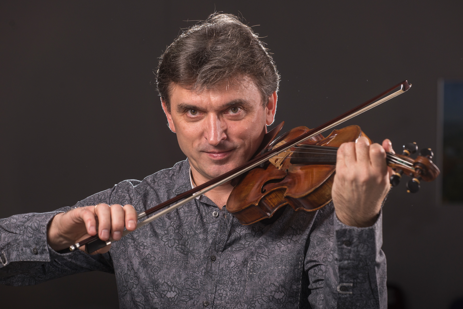 Siergiej Wowkotrub - Foto Marcin Skabek